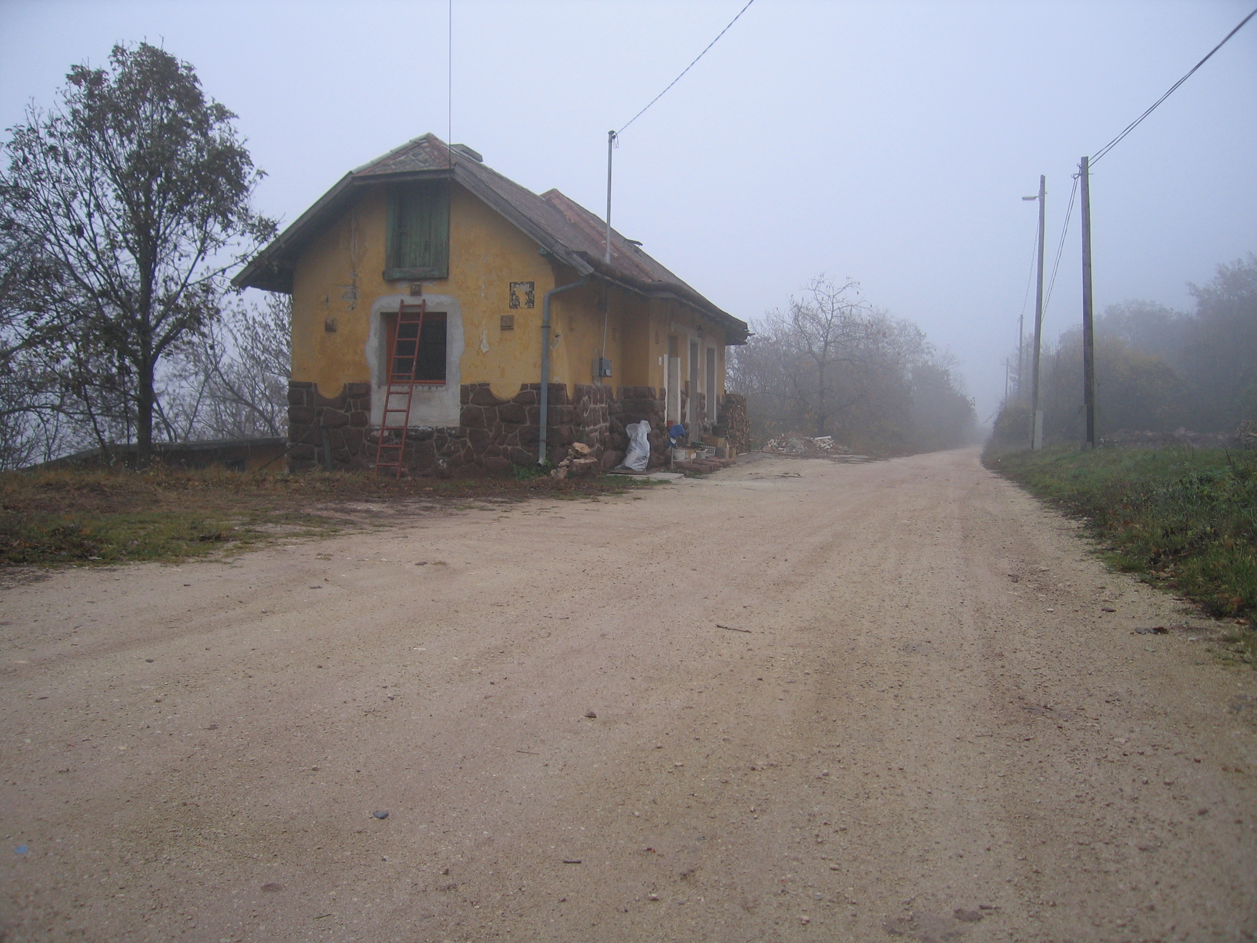 Balatonalmádiban lévő volt Remete-völgyi megállóhely, a volt Alsóörs-Veszprém vasútvonalon.